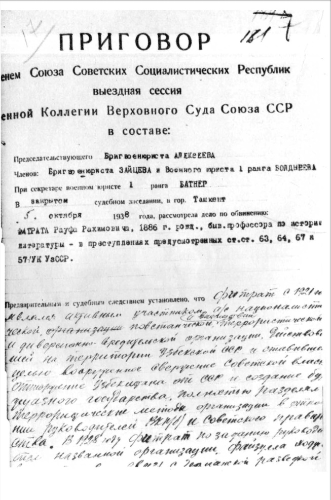 Oʻzbekcha/ўзбекча: SSSR Oliy Sudi tomonidan chiqarilgan Fitratga o‘lm jazosi berish haqidagi qaror (1938 yil 5 oktabr)